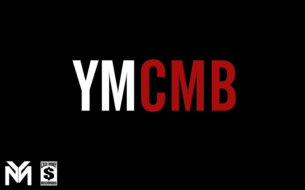 YOUNG MONEY CASH MONEY